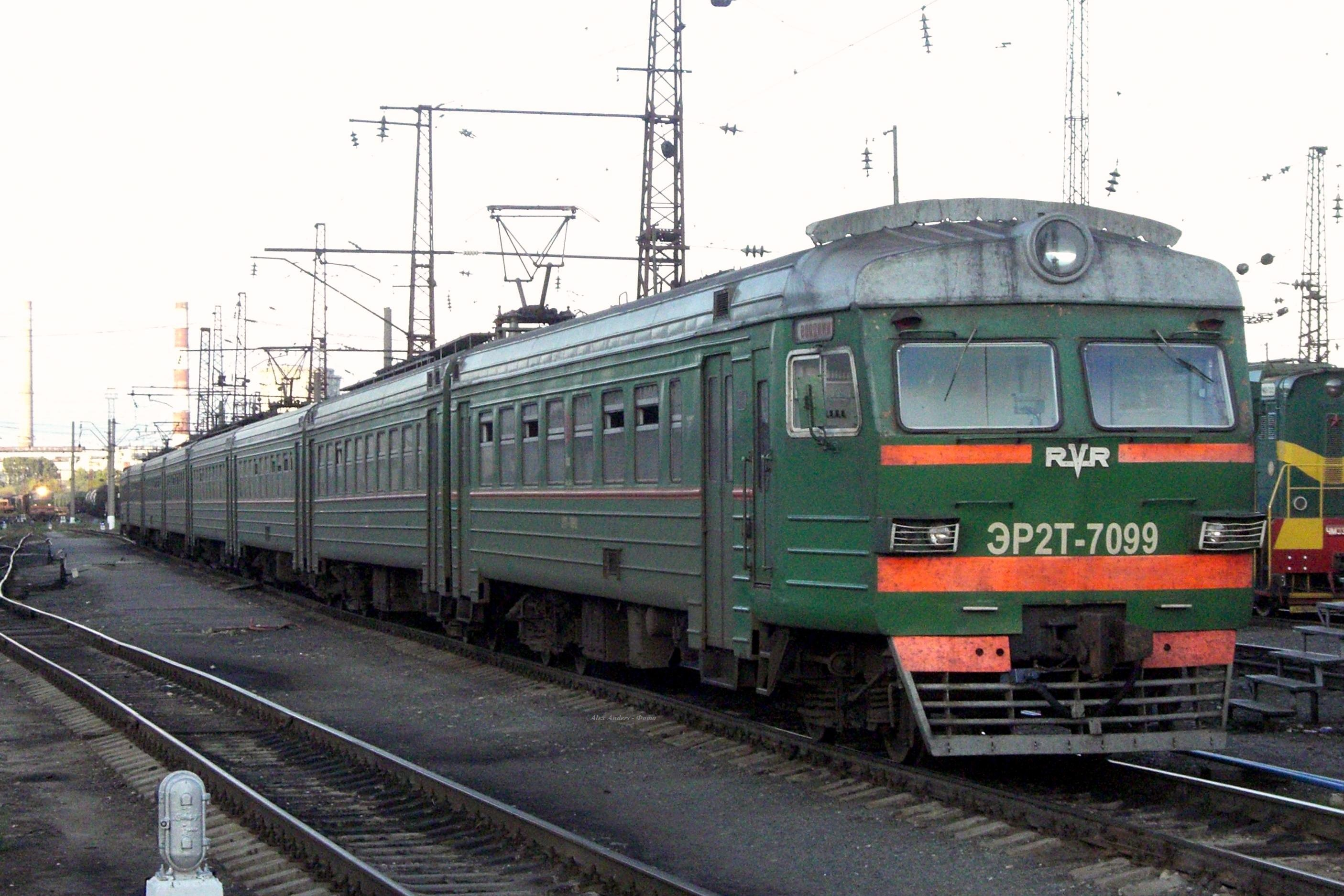 "Короткий" электропоезд ЭР2Т-7099, с 2006 по 2011 год эксплуатировавшийся на участке Петушки - Владимир Горьковской ЖД, на станции Владимир